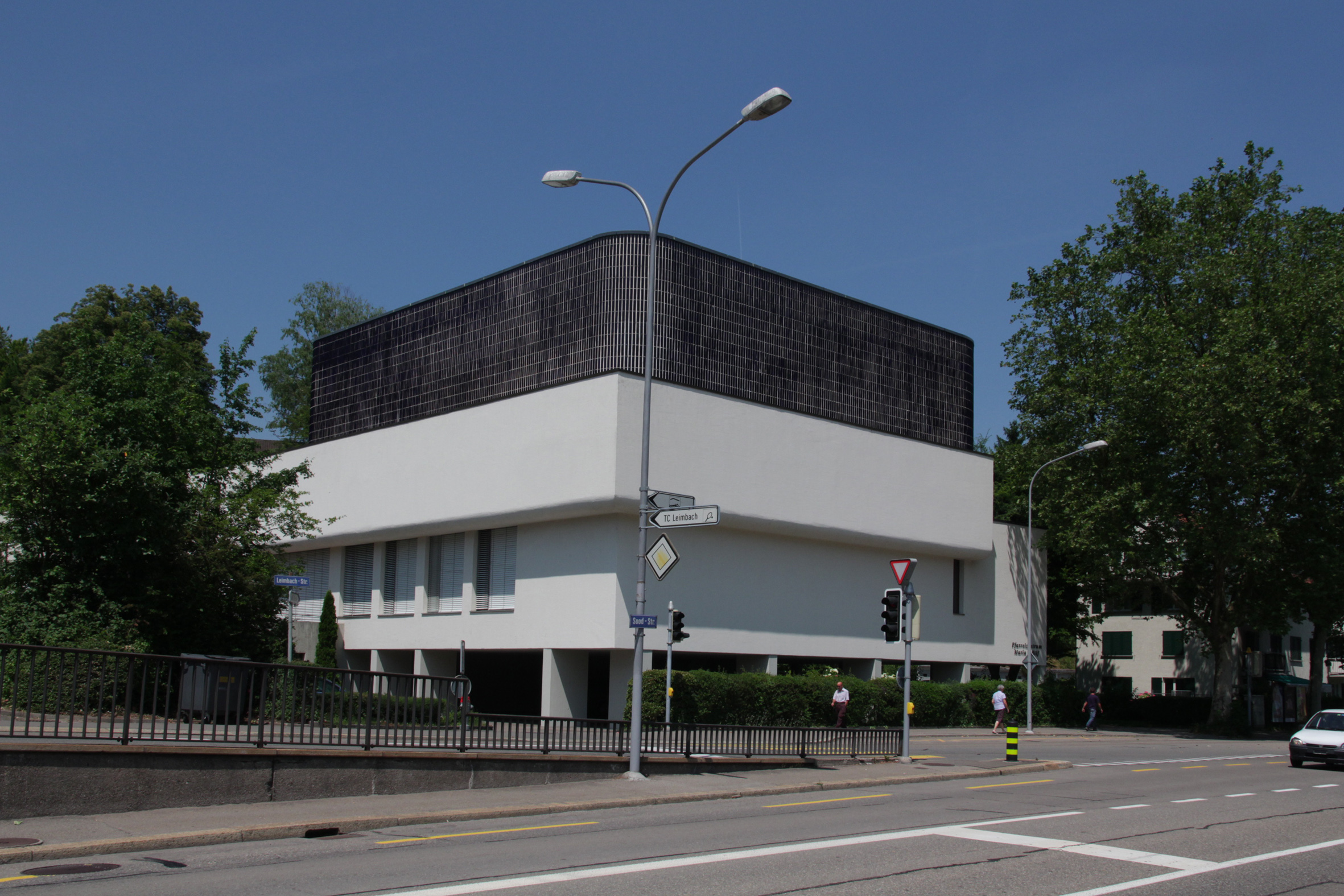 Römisch-katholische Kirche Maria Hilf, Zürich-Leimbach